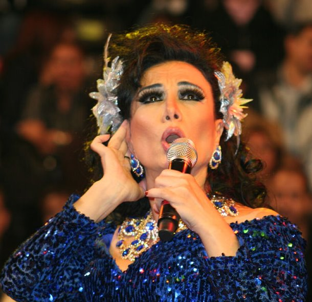 Beatriz Adriana en el Expogan de Sonora.